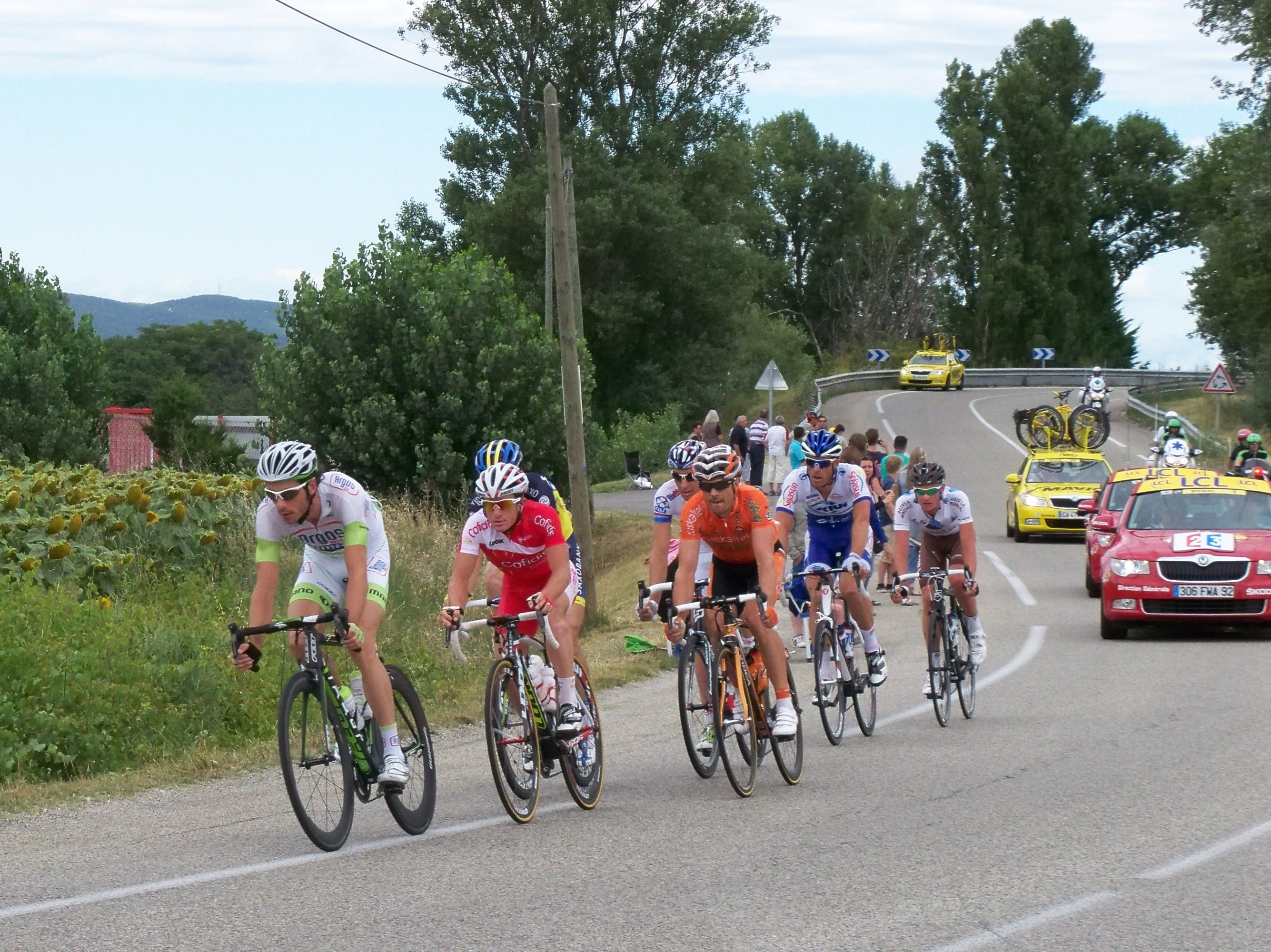 échappée lors de la 13ème étape, à Lamotte du Rhône (84)